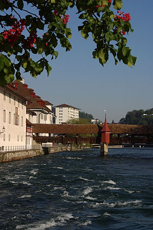 Reuss mit Spreuerbrücke(Nr. 03.1-4694)